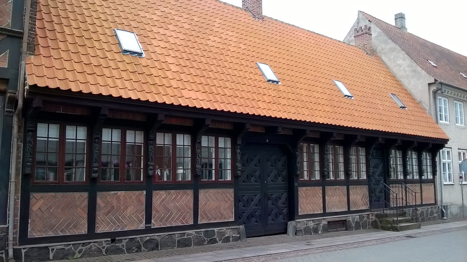 Apostle på Apostelhuset i Riddergade, Næstved.